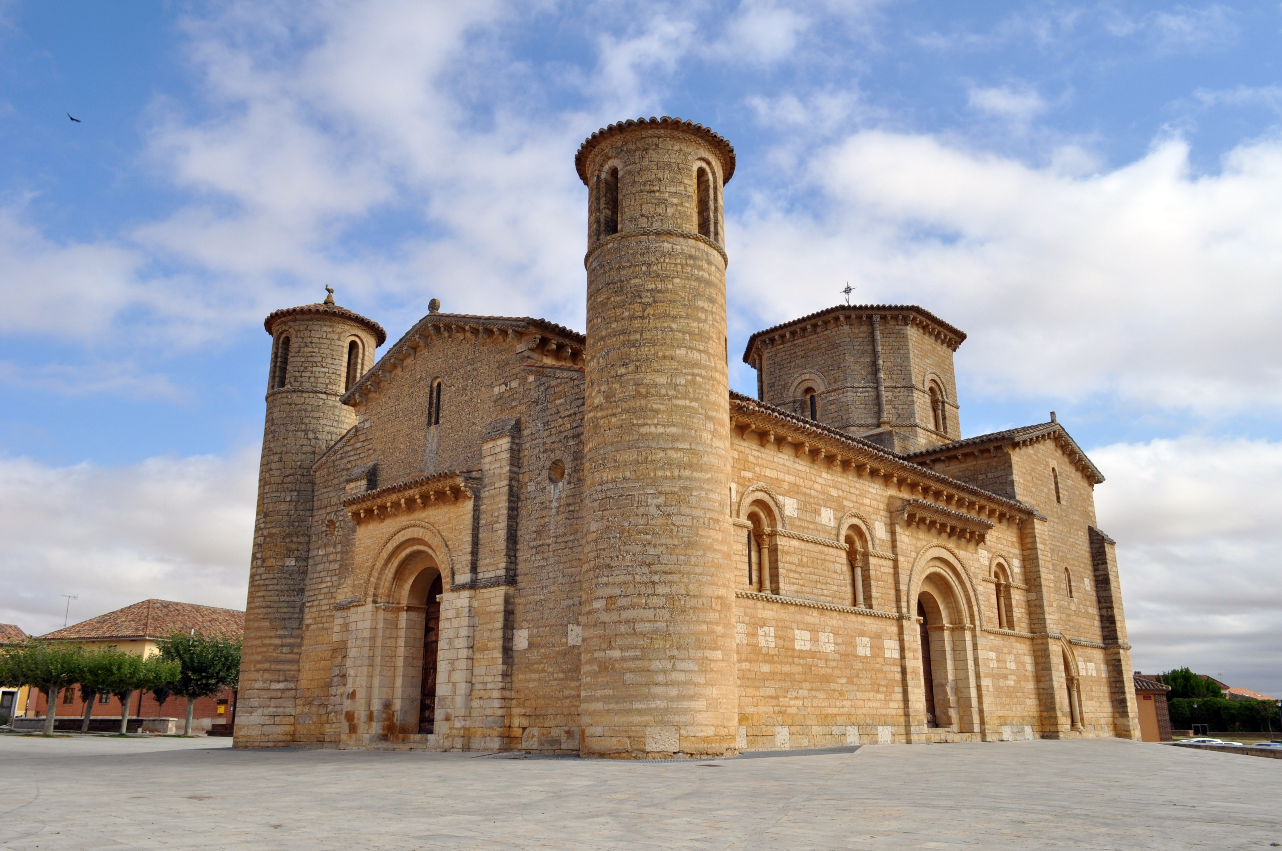 San Martín, Frómista